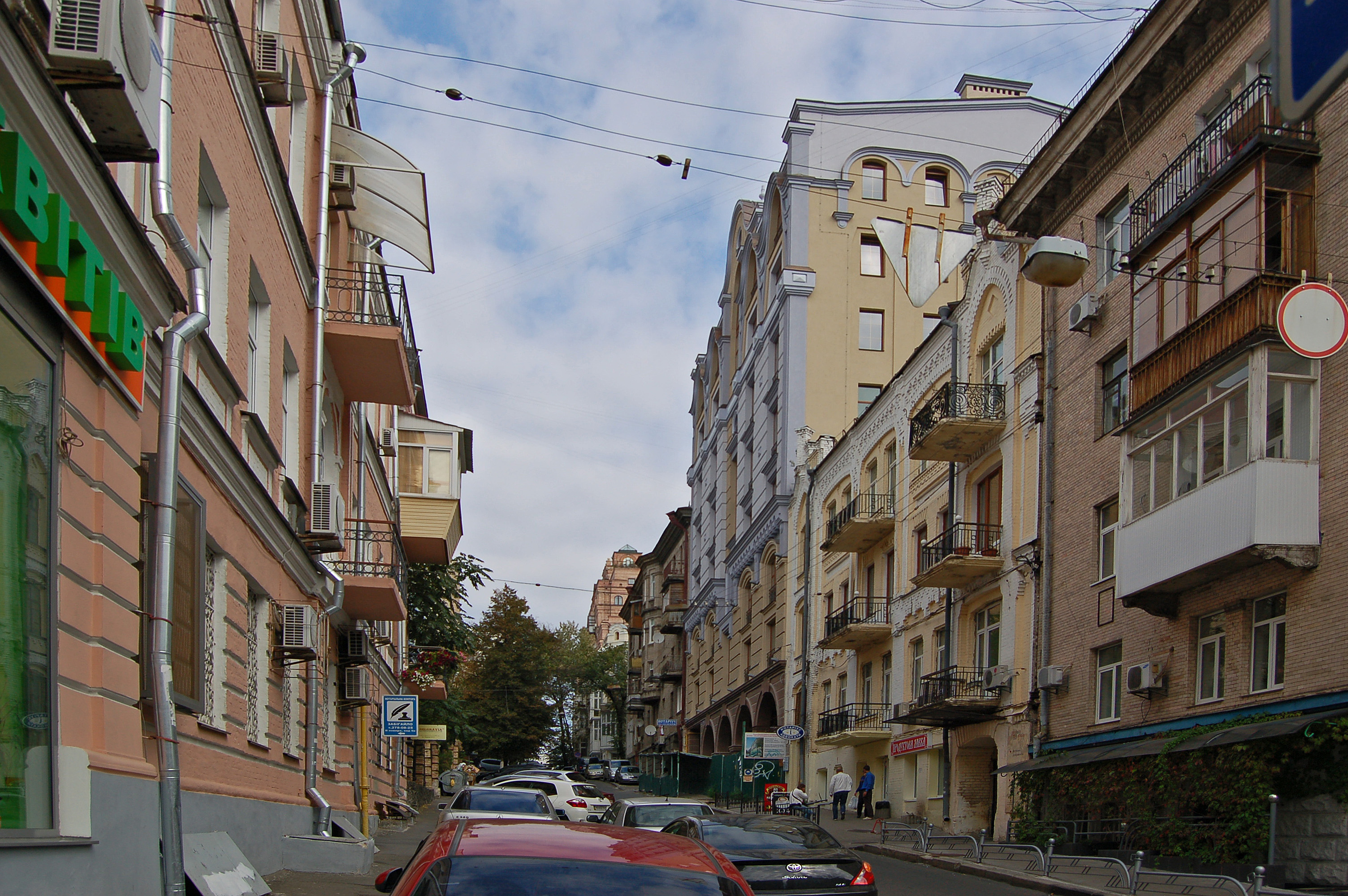 Вулиця Паторжинського у Києві